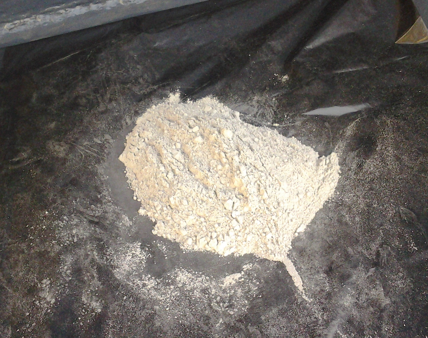 Sproszkowany baryt do sporzadzania pluczki wiertniczej